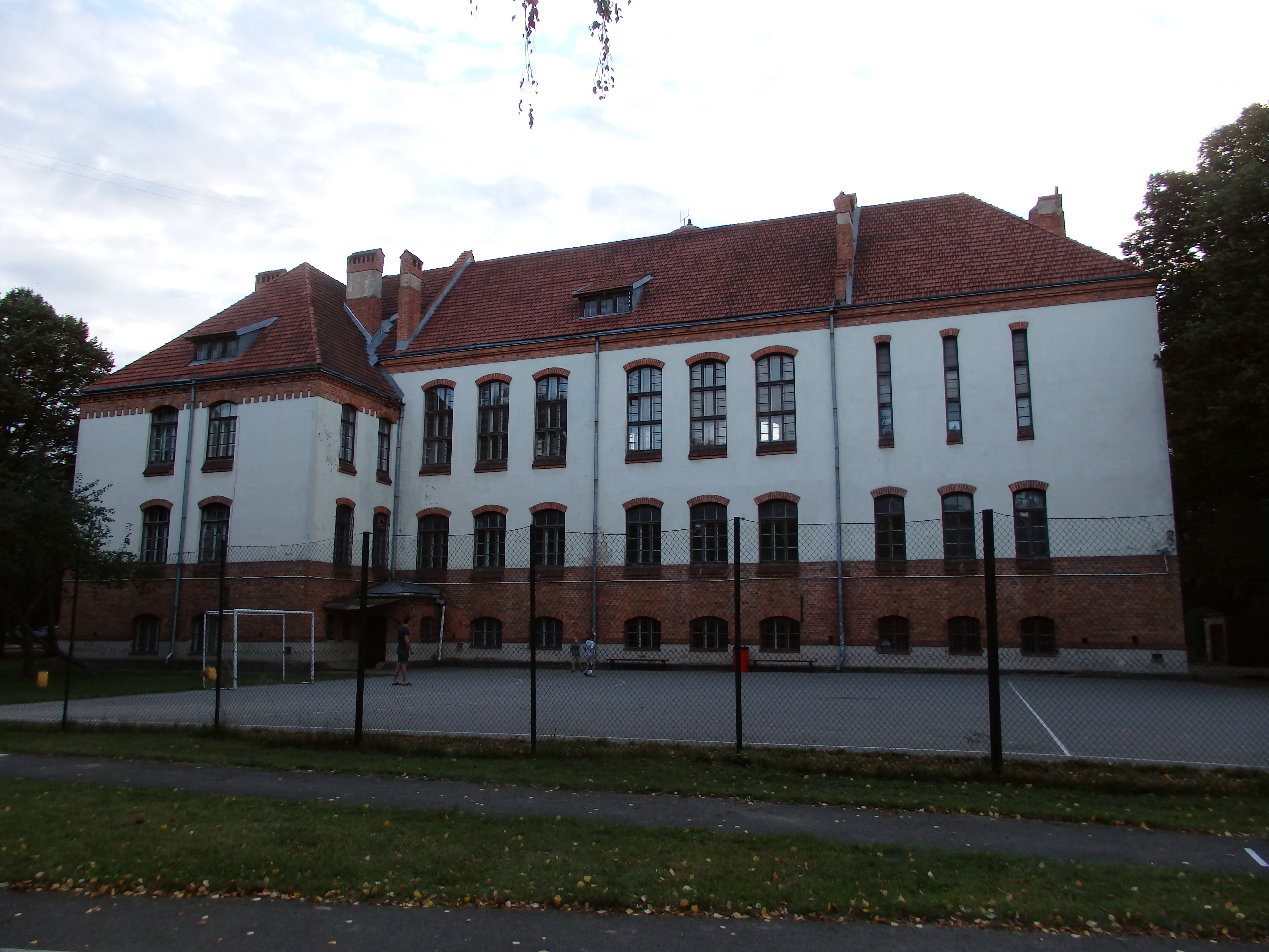 Skola, Rīga, Gaujas iela 21